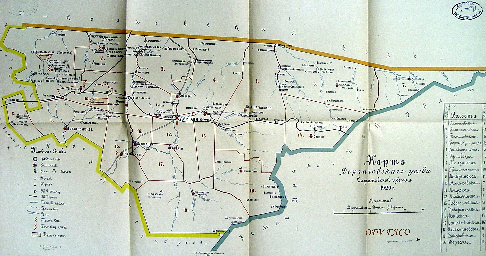 Карта Дергачевского уезда 1920 года